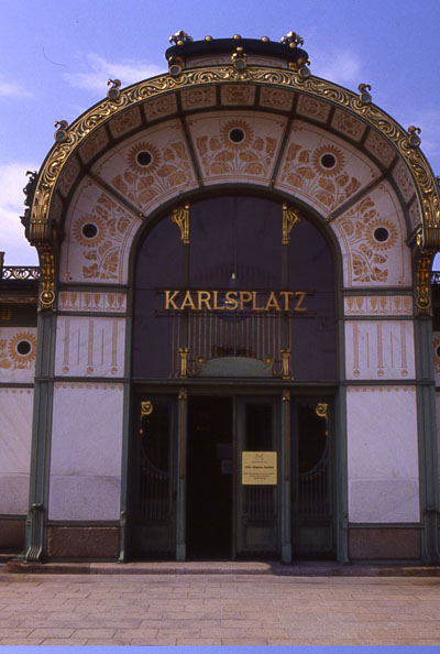 Estación de metro de Karlsplatz, en Viena. Obra de Otto Wagner. Autor: Rafaelji. Tomada en agosto de 1987. Diapositiva EKTACHROME, 35 mm.